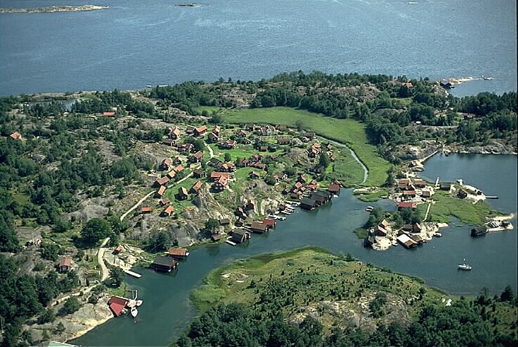 Motiv: Harstena Nyckelord: Flygbilder, Riksintressen Kategori: Kust- och skärgårdsmiljö, FiskelägeHarstena